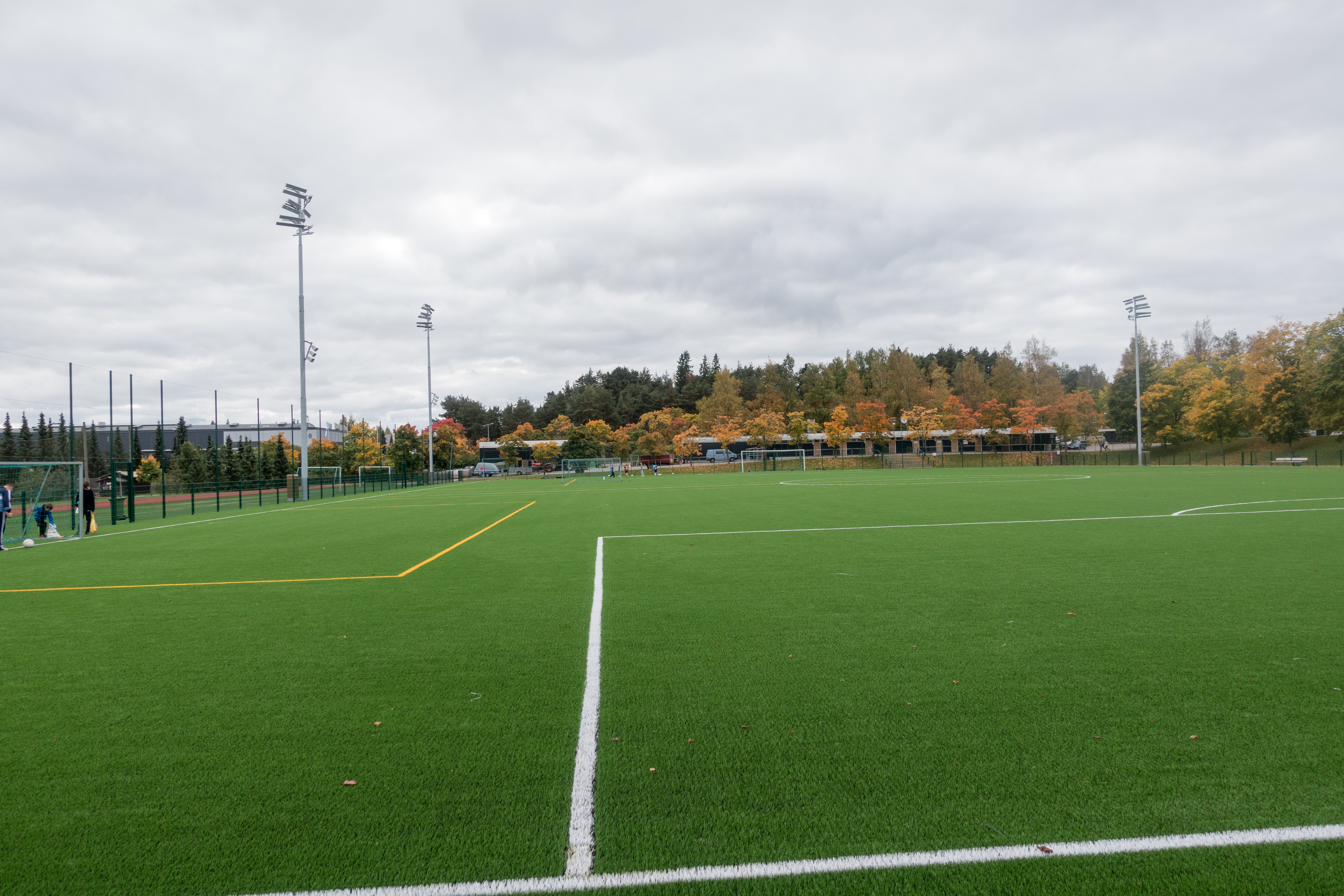 Salon tekonurmikenttä Salossa